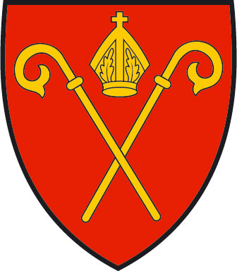 Wappen der Gemeinde Naters